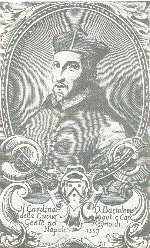 Retrato del cardenal Bartolomé de la Cueva y Toledo (1499-1562), natural de Cuéllar.